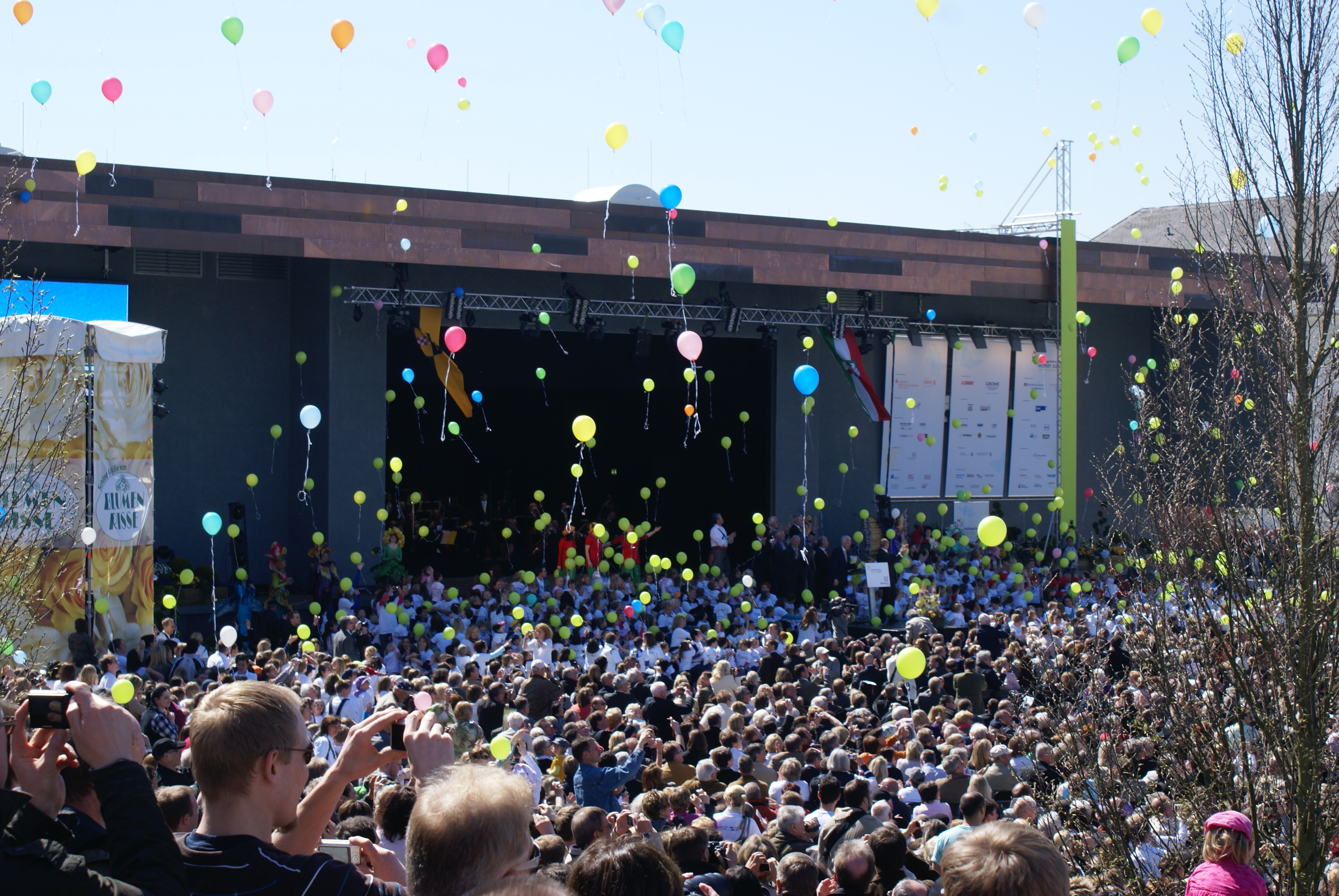 Abschluss des Festaktes zur Eröffnung der Landesgartenschau Hemer